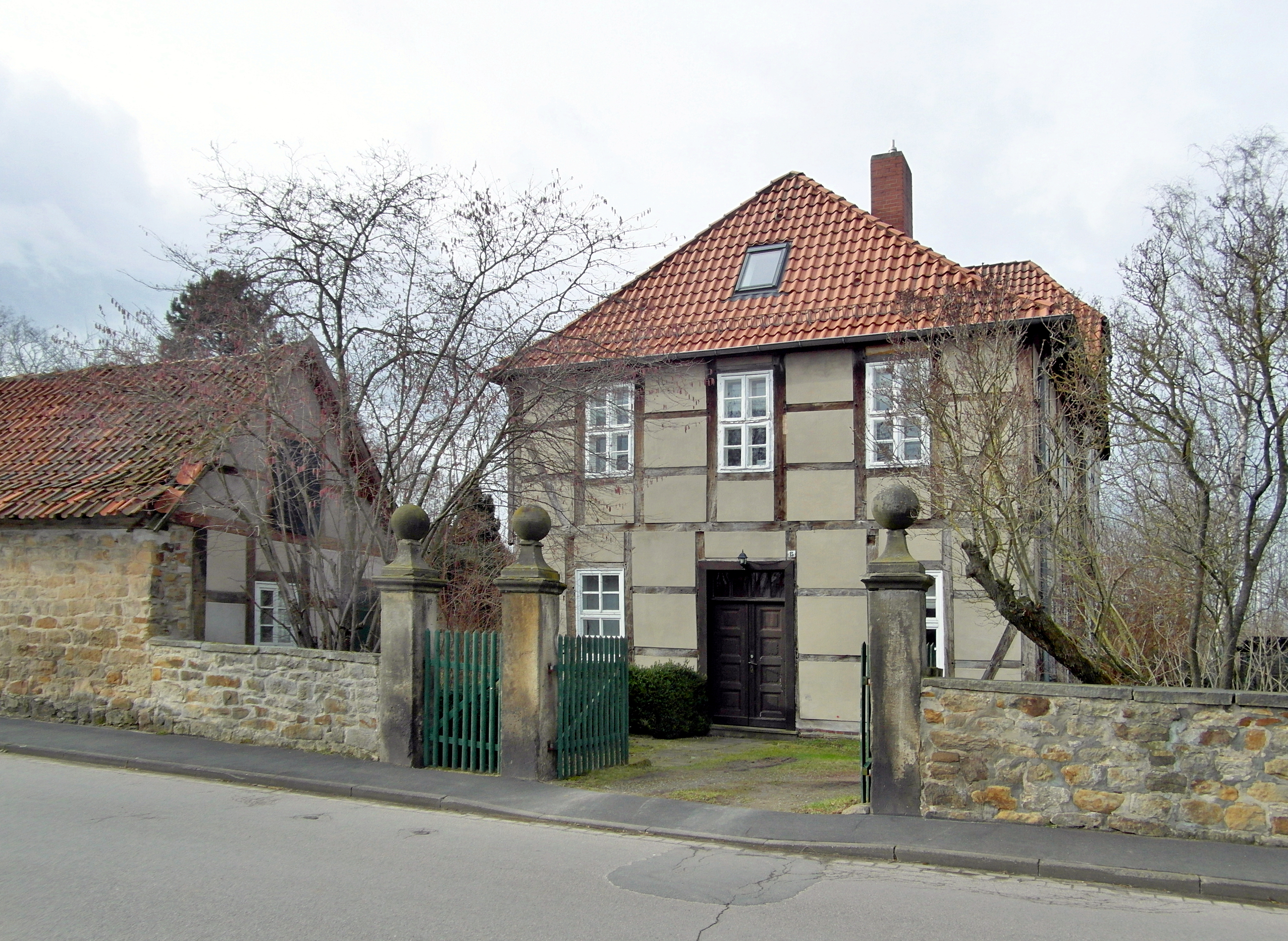 Das Herrenhaus des Unterguts Egestorf ist ein schlichter zweistöckiger Fachwerkbau der vermutlich im 18. Jahrhundert errichtet wurde